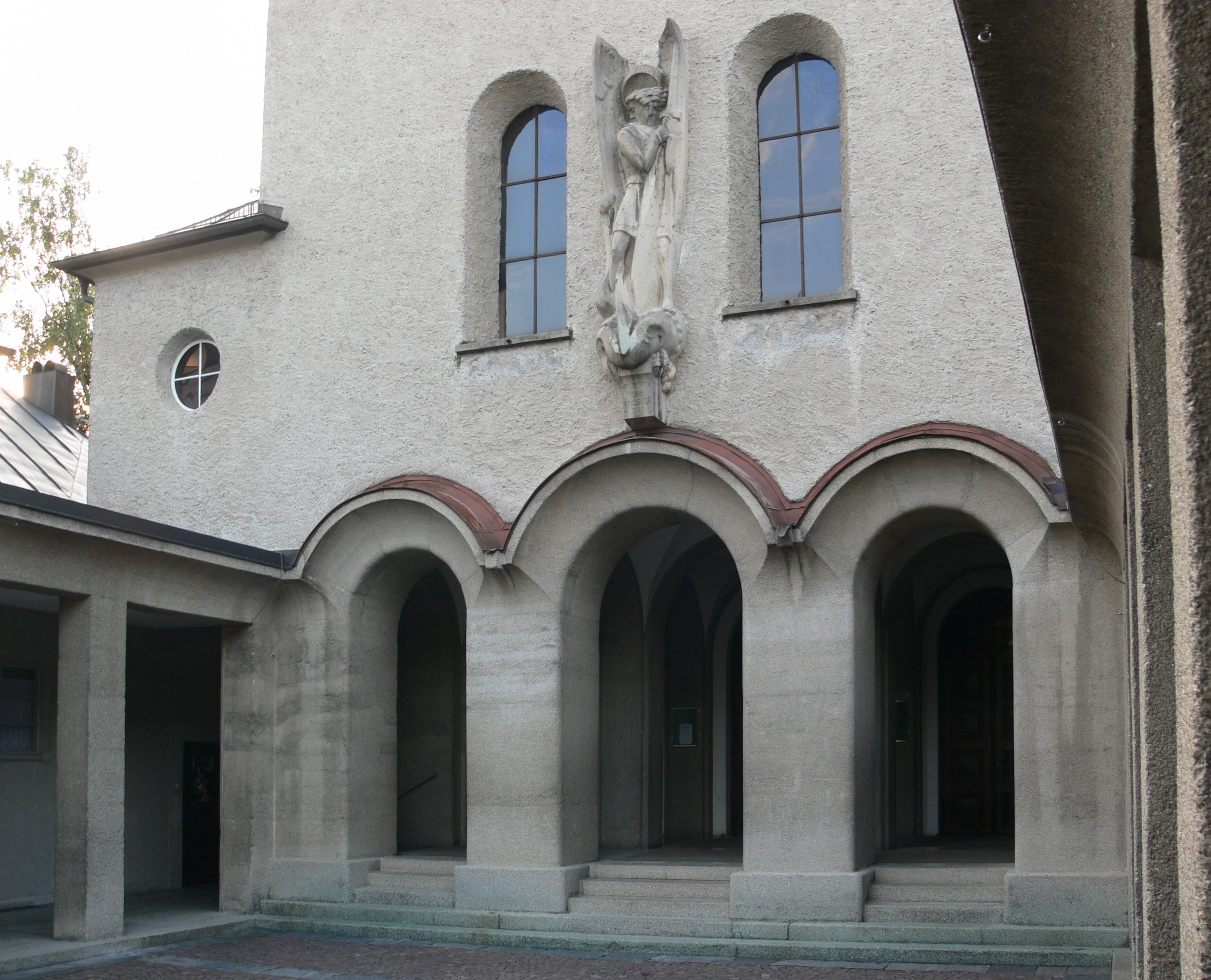 Pfarrkirche Mariahilf, Bregenz Hof (geplant als „Heldenhof“ der „Heldendankkirche“)